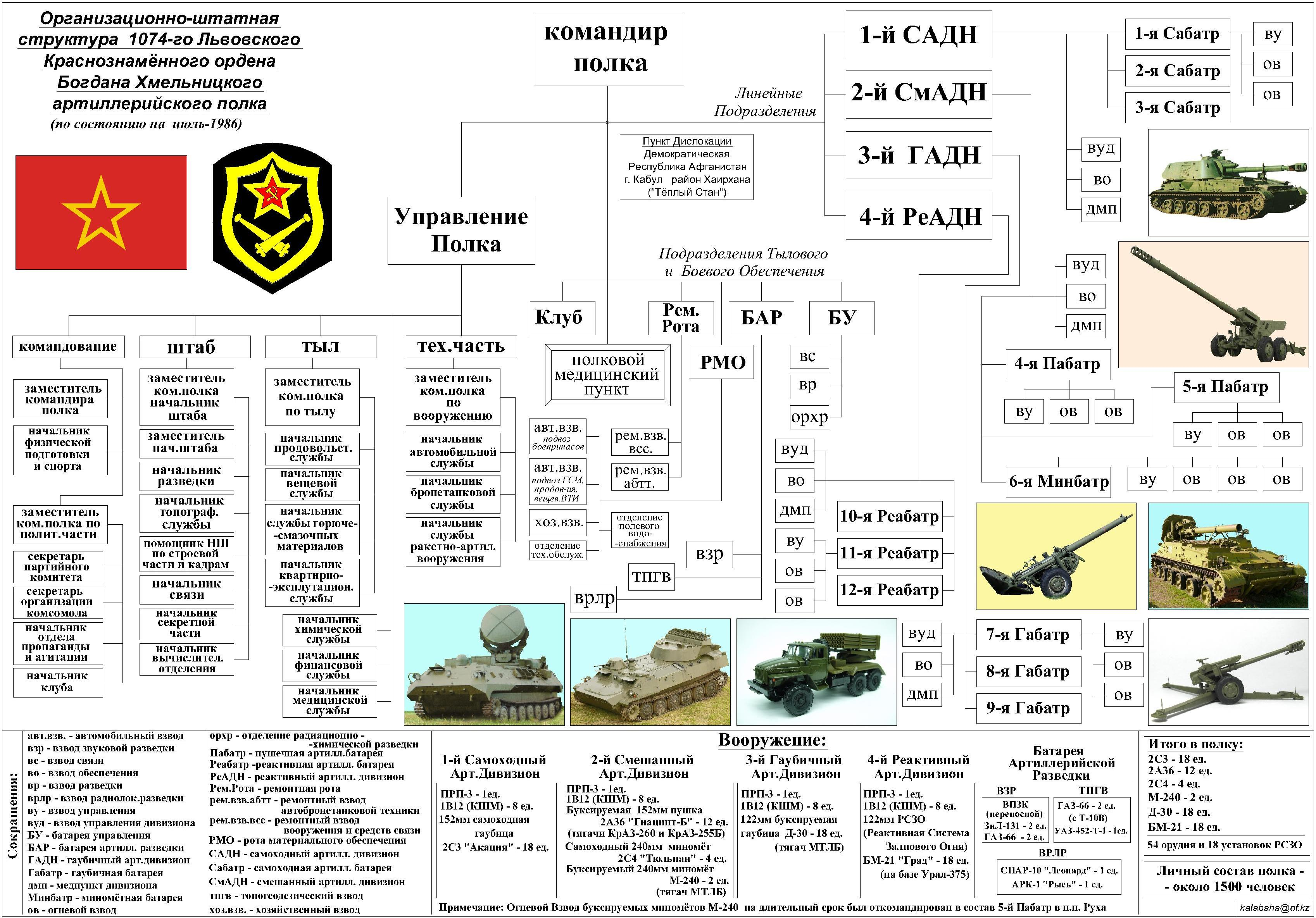 Организационно-Штатная Структура 1074-го артполка 108-й мсд на июль-1986. Собственная работа на основе данных взятых с сайта 108-й мсд данных взятых у Бешкарева Александра Ивановича "ПЕРЕЧЕНЬ СОВЕТСКИХ ВОИНСКИХ ЧАСТЕЙ В АФГАНИСТАНЕ (1979-1989 гг.)" с сайта и данных предоставленных ветеранами полка. Отчерчено в AutoCAD 2005 собственноручно.